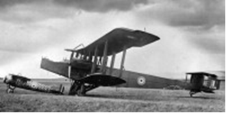 Handley Page - size